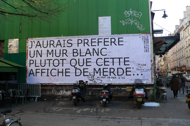 Collage en 2008 de l'oeuvre de RERO sur Le M.U.R. au croisement de la rue Oberkampf et de la rue Saint-Maur (Paris 11ème).